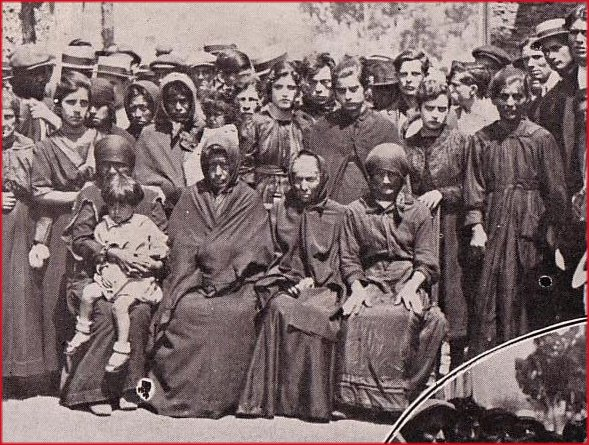 Semana Trágica de 1919. Buenos Aires. Familiares de luto durante el velorio de Toribio Barrios, Santiago Gómez, Miguel Britos, y Eduardo Basualdo en la sede de la Sociedad de Resistencia Metalúrgicos Unidos en la avenida Amancio Alcorta 3483.